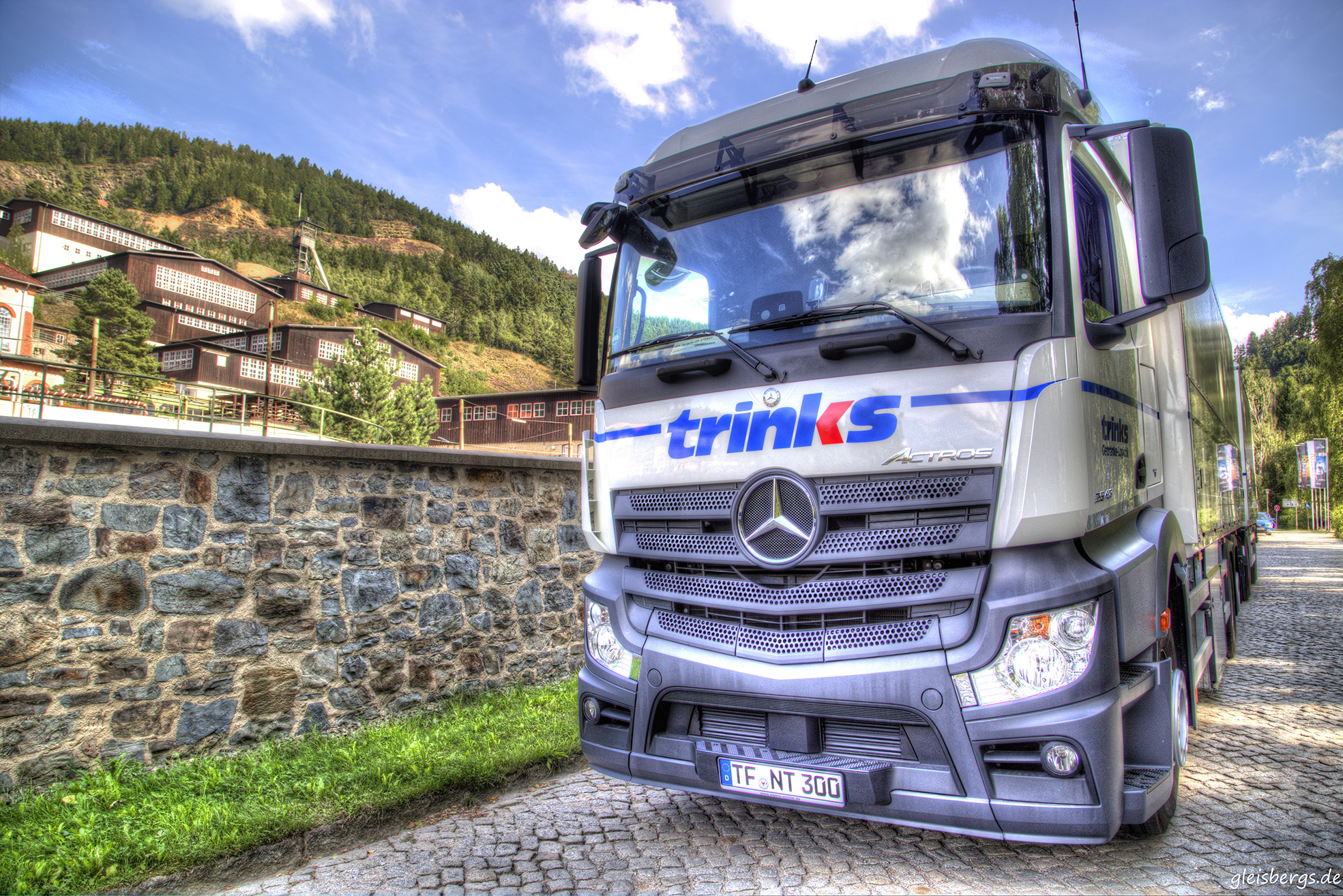 Trinks LKW – Bild wurde farblich verändert – Stimmungsbild